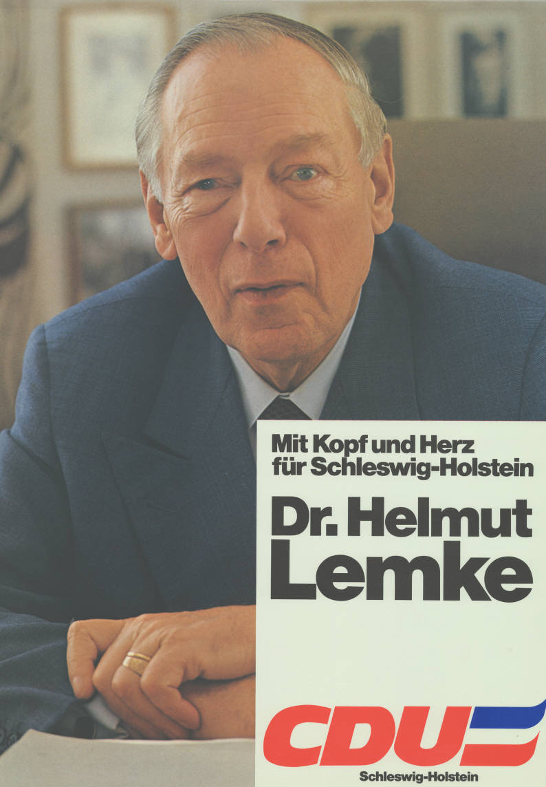 Mit Kopf und Herz für Schleswig-Holstein Dr. Helmut Lemke CDU Schleswig-Holstein Abbildung: Foto Plakatart: Kandidaten-/Personenplakat mit Porträt Auftraggeber: Verantw.: CDU Schleswig-Holstein Objekt-Signatur: 10-012 : 431 Bestand: Landtagswahlplakate Schleswig-Holstein (10-012) GliederungBestand10-18: Landtagswahlplakate Schleswig-Holstein (10-012) » Landtagswahl am 29.4.1979 » Kandidatenplakate Lizenz: KAS/ACDP 10-012 : 431 CC-BY-SA 3.0 DE